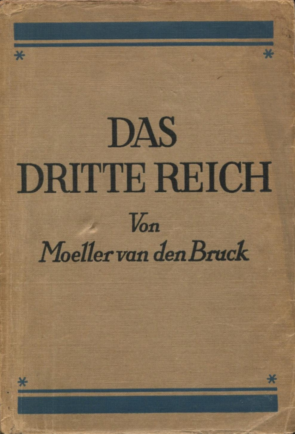 Arthur Moeller van den Bruck: Das Dritte Reich. Berlin: Verlag Der Ring, 1923, Erste Ausgabe/First edition